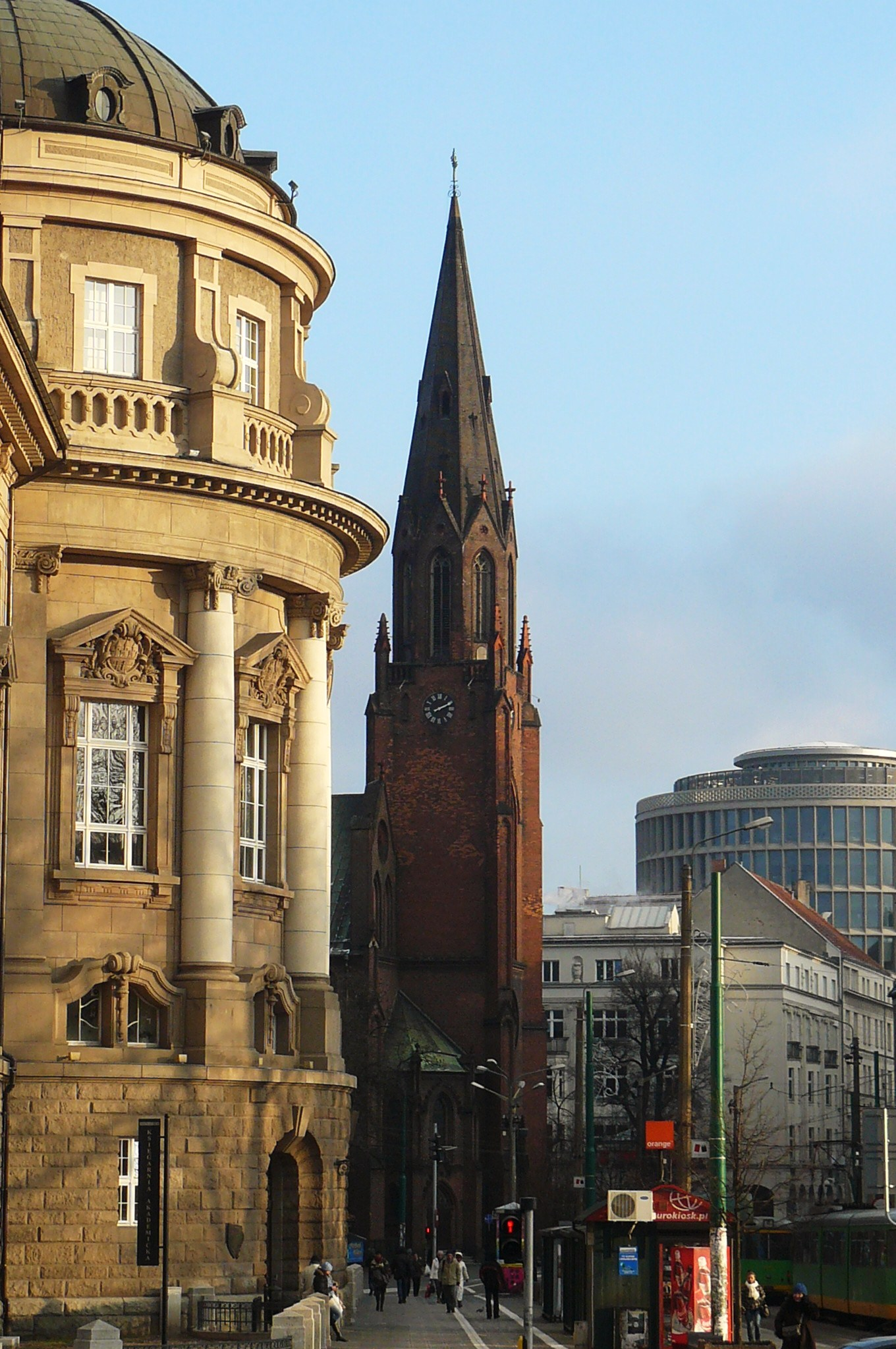 Perspektywa ul. Fredry w Poznaniu.